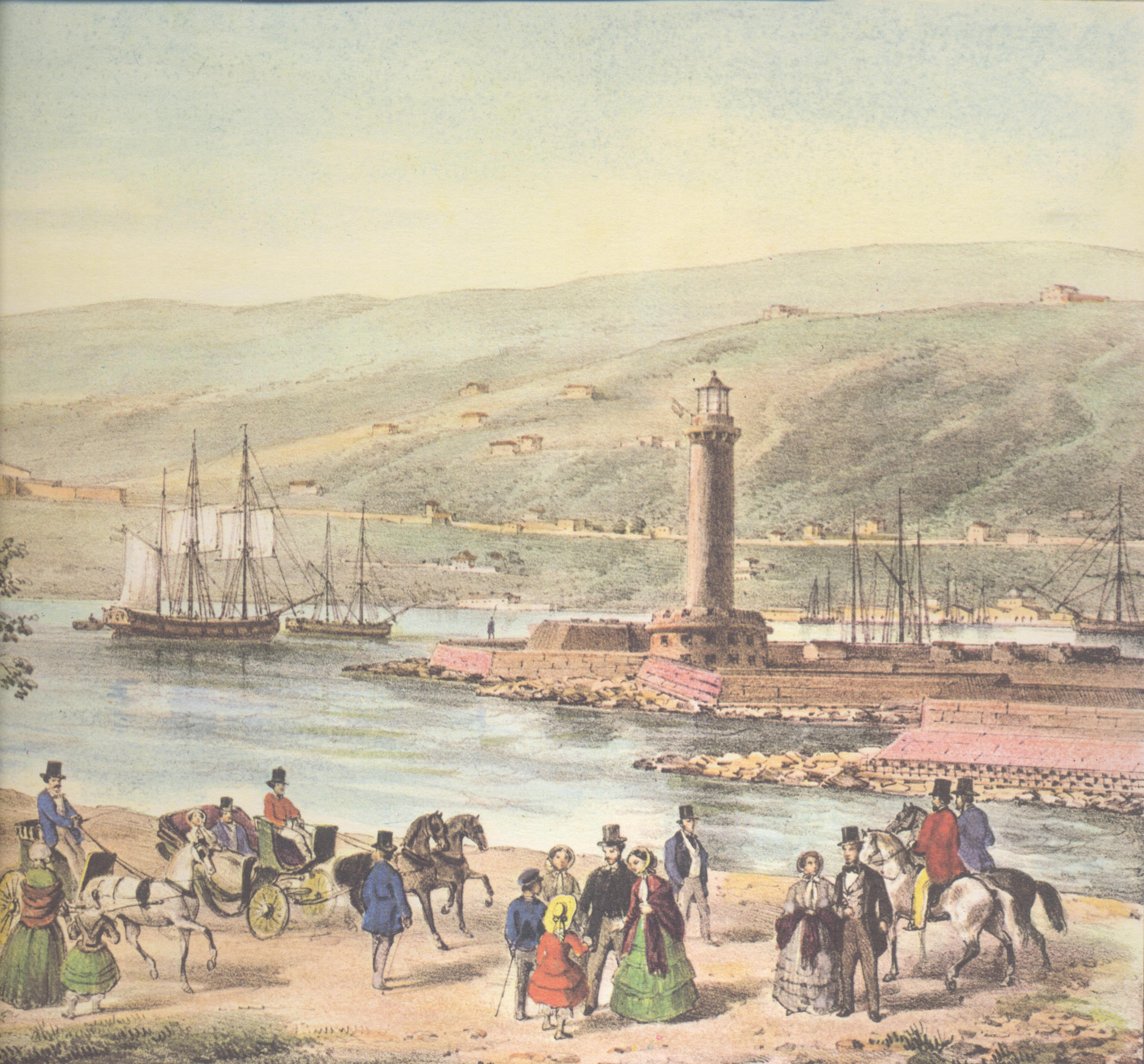 Lanterna di Trieste - Particolare da un disegno di Marco Moro del 1854.